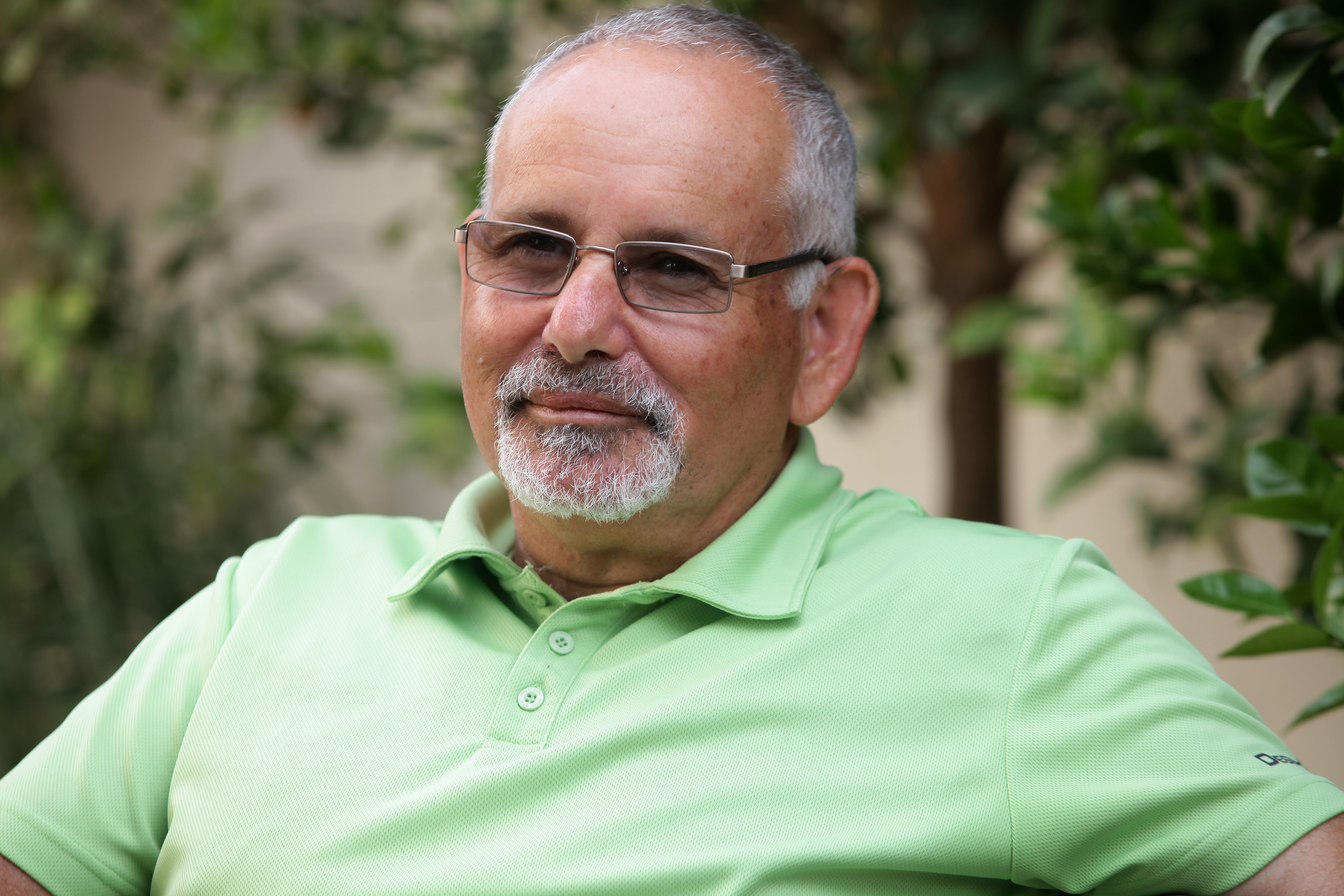 אבישי לנדאו